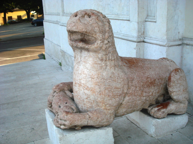 Una leonessa marmorea a sinistra del portale d'ingresso della Parrocchiale di Leno